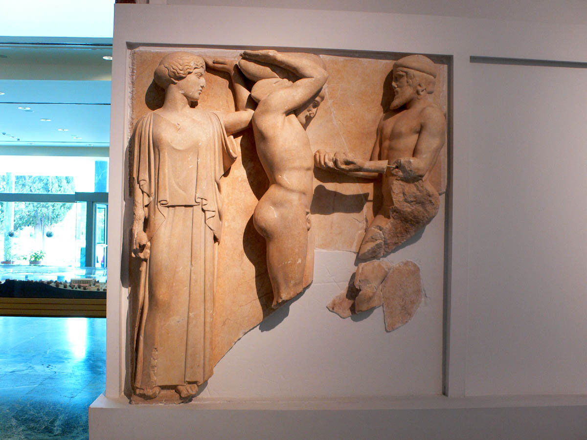 Metopa del templo de Zeus en Olimpia con los trabajos de Hércules. Museo arqueológico de Olimpia.